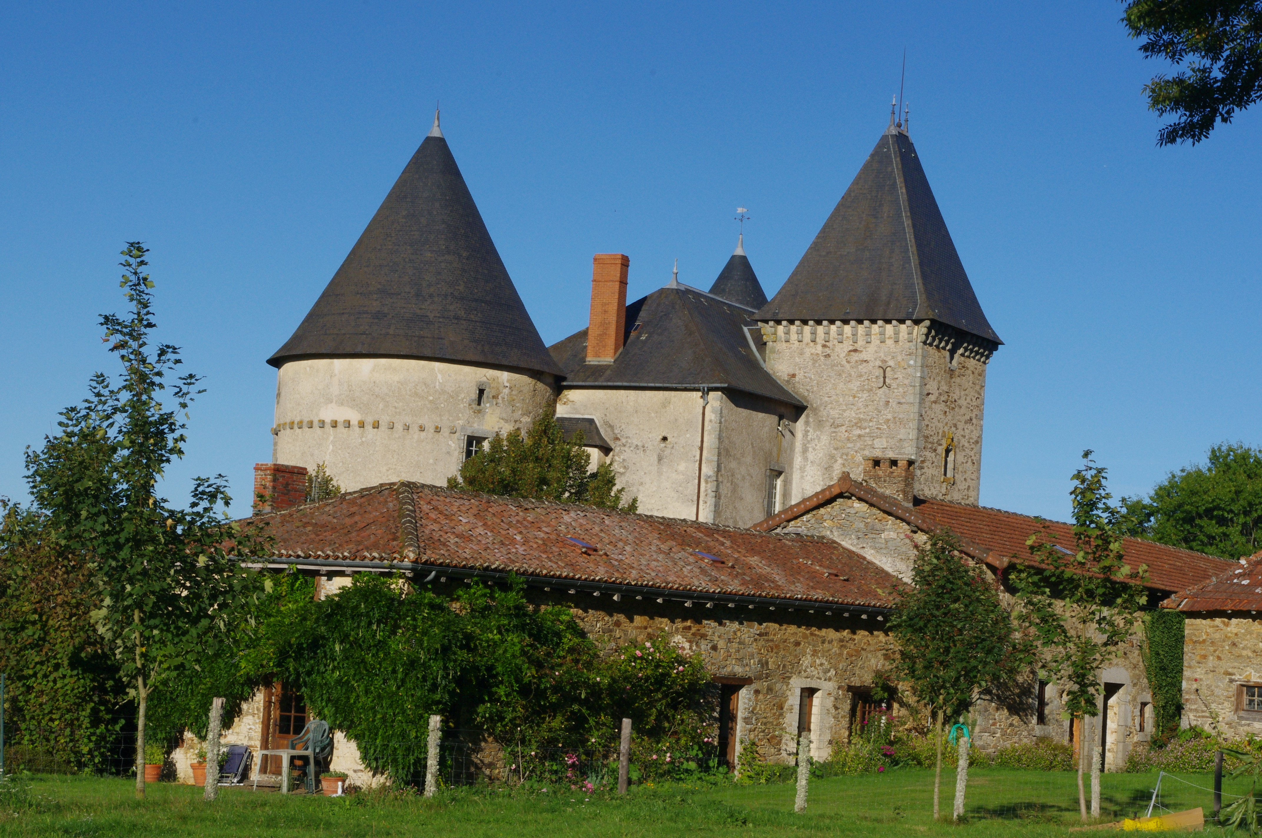 Château de Brie, commune de Champagnac-la-Rivière, Haute-Vienne, France